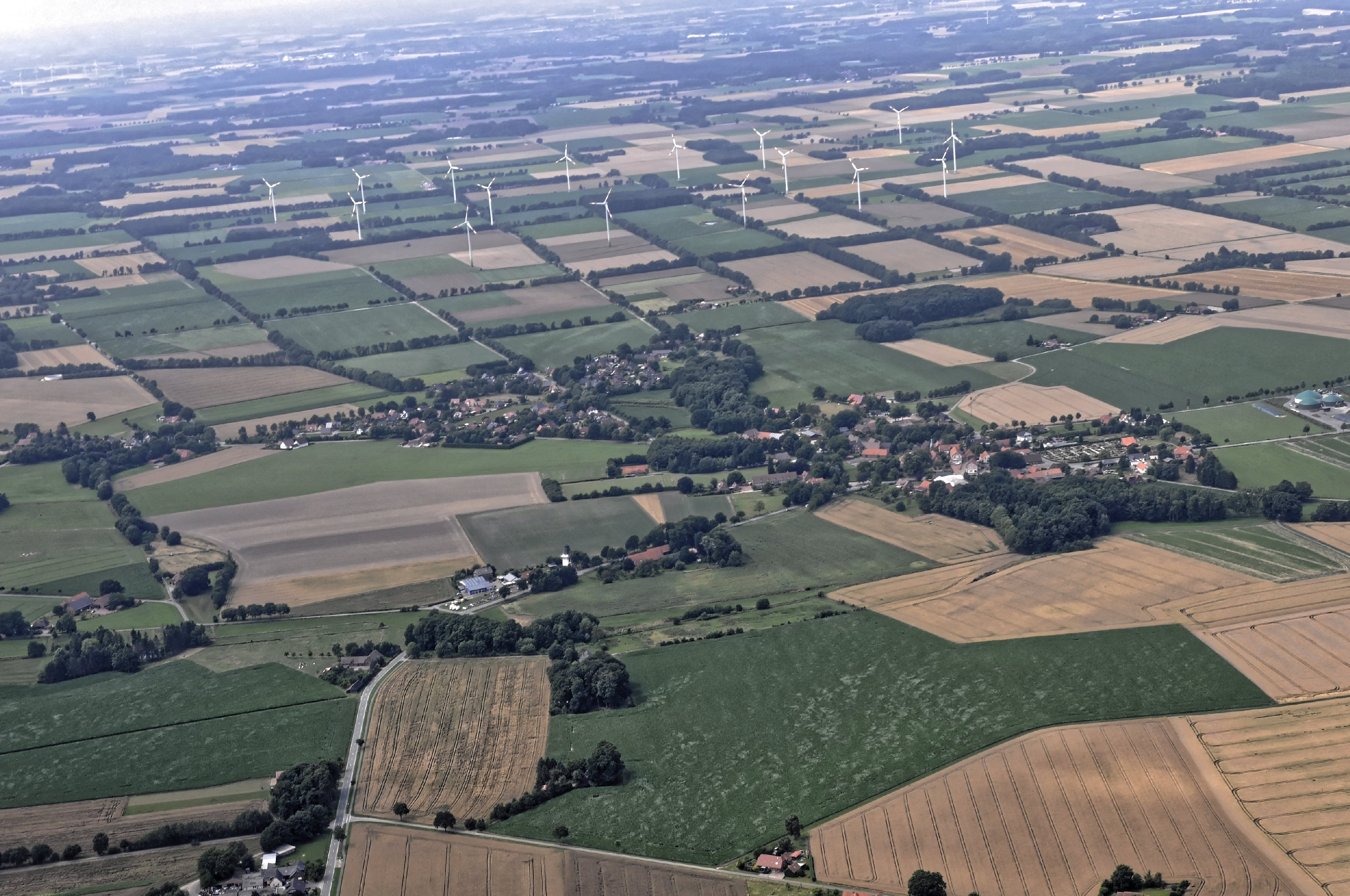 Bilder vom Flug Nordholz-Hammelburg 2015: Sudwalde, Blick von Osten.